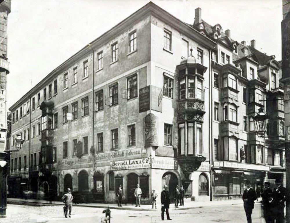 Reichsstraße Ecke Grimmaische Straße, Vorgängerbau des Reichshofs